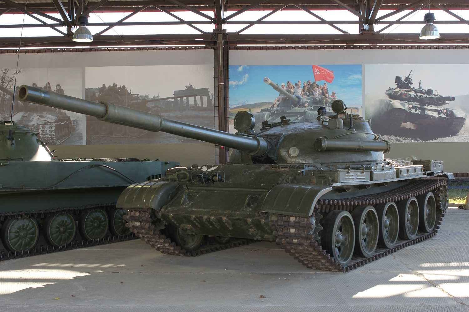 Средний танк Т-62 в Музее отечественной военной истории